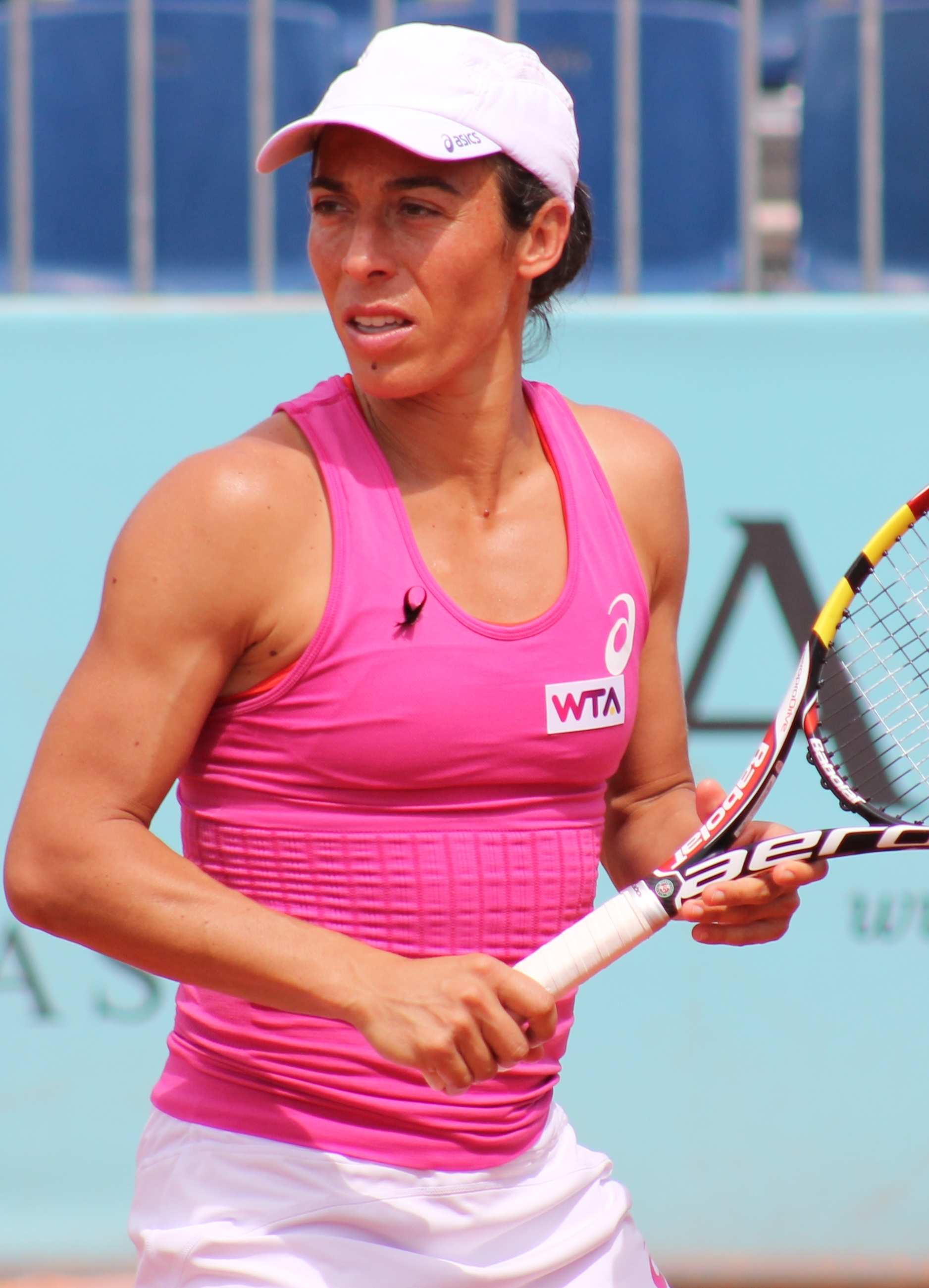 Schiavone MA14